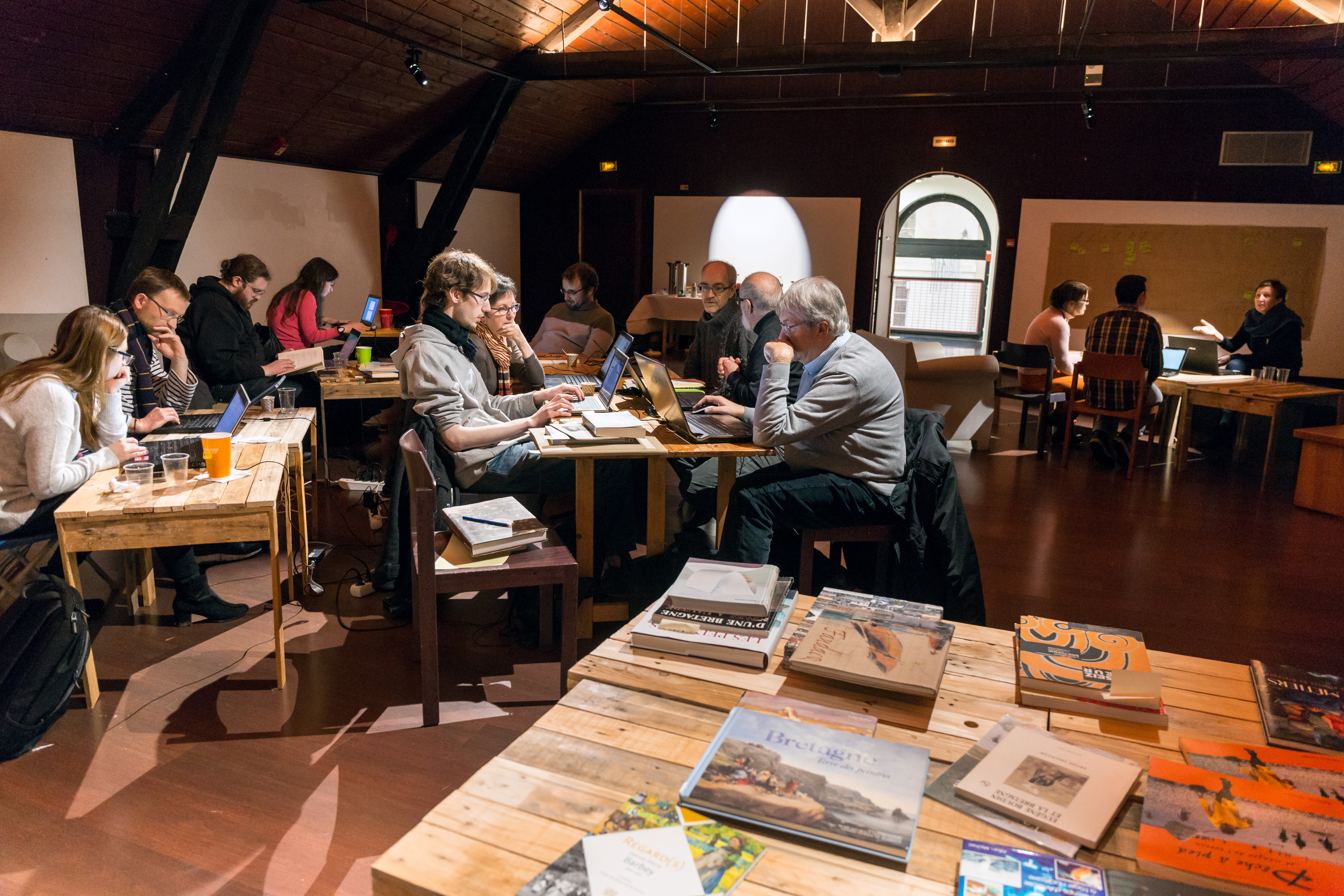 Participants au premier editathon organisé par le Musée d'Art et d'Histoire de Saint-Brieuc, autour de divers projets Wikimédia, le dimanche 19 novembre 2017.